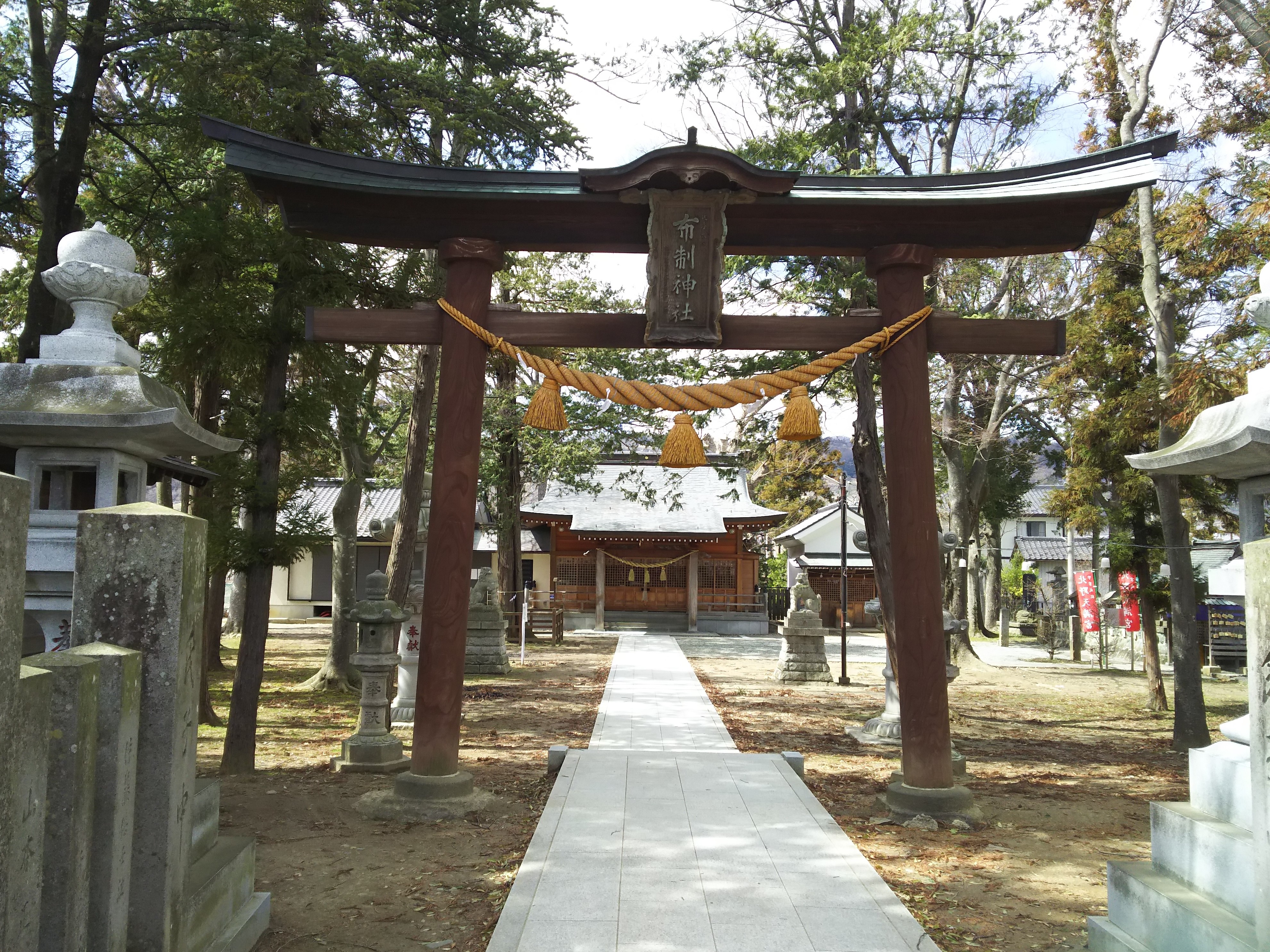 布制神社 2018年3月23日に撮影